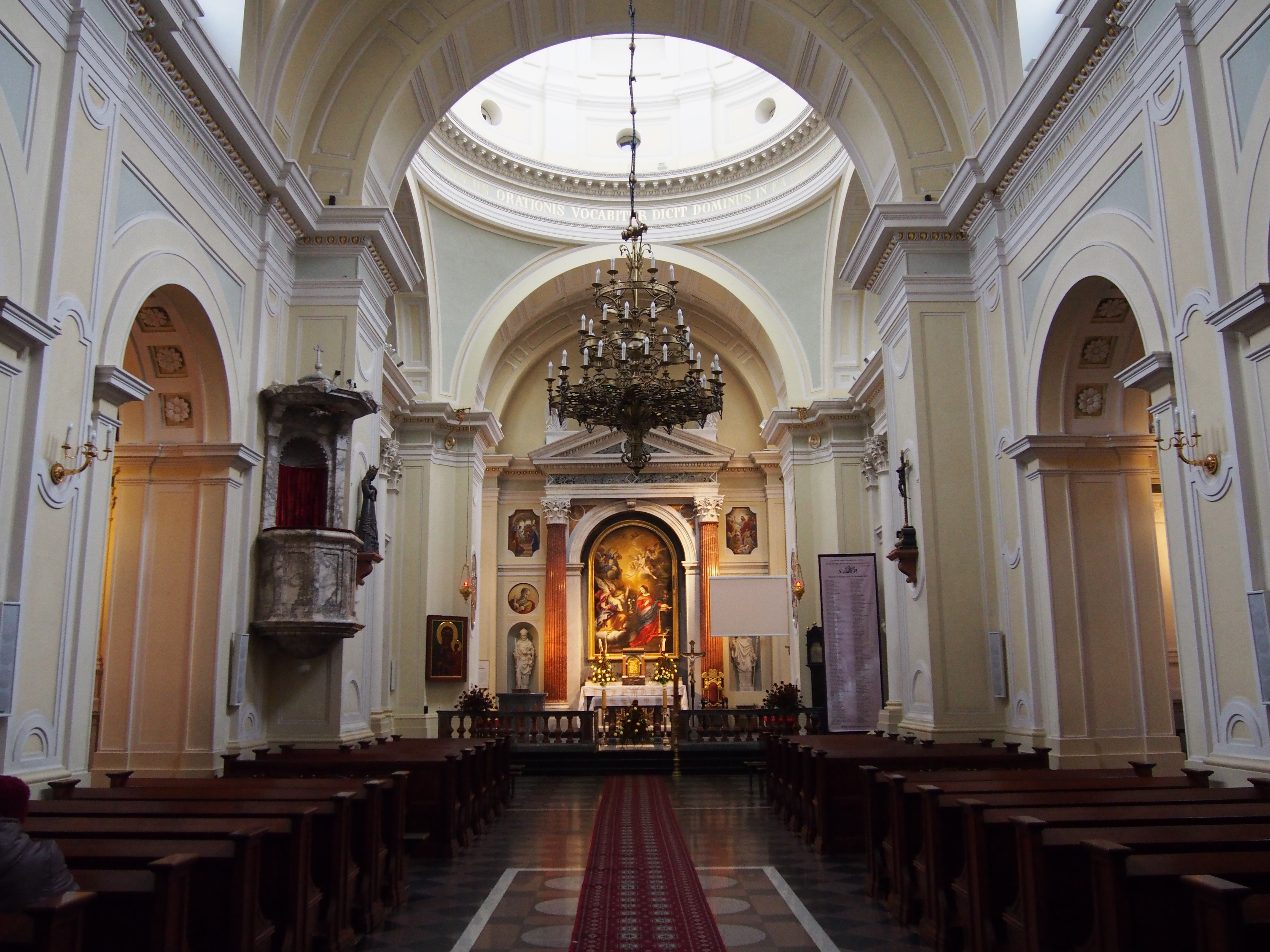 Kościół św. Anny w Warszawie (Wilanów).